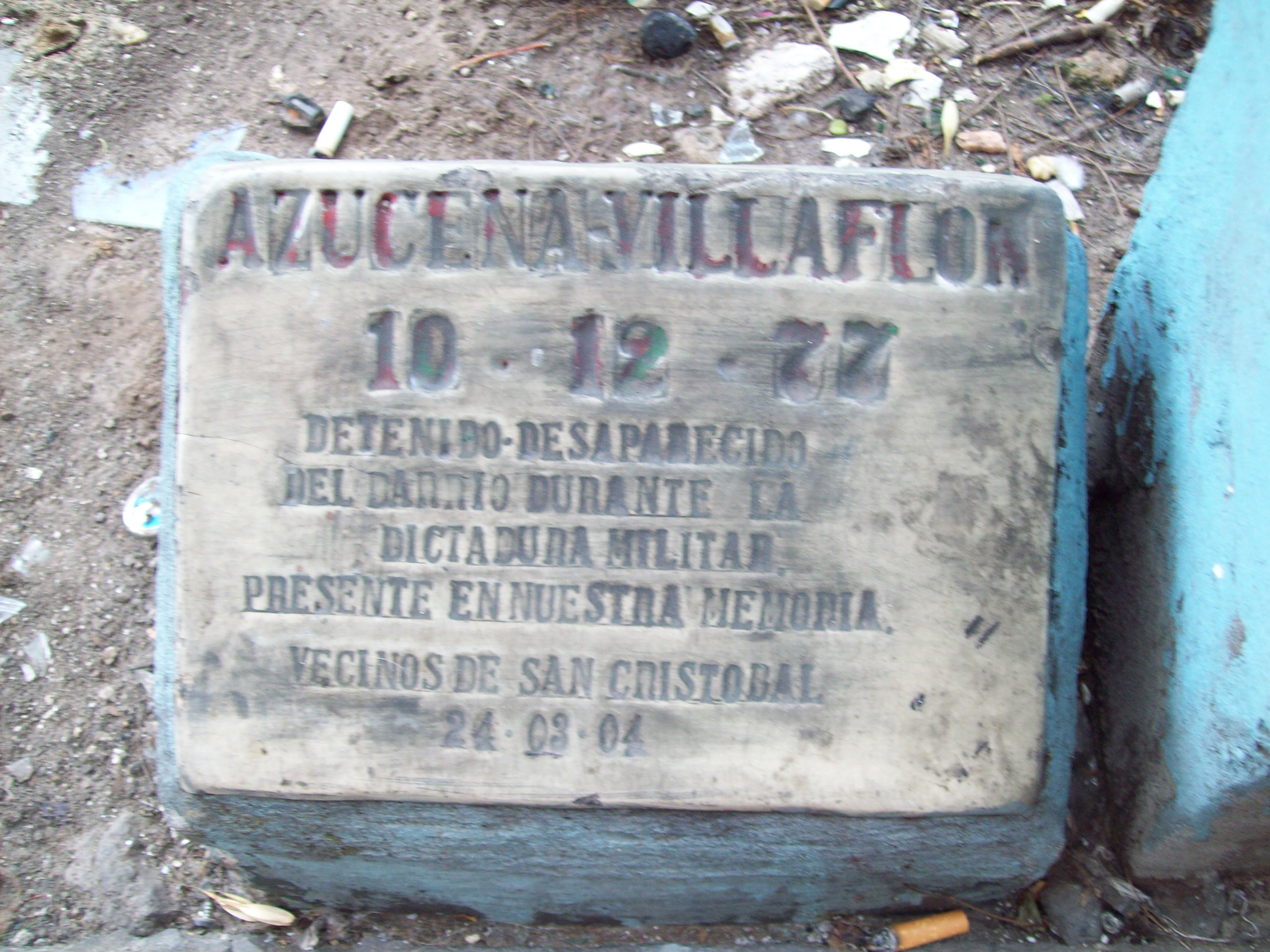 Memorial en homenaje a desaparecidos durante la dictadura cívico-militar argentina (1976-1983), en el barrio de Boedo, ciudad de Buenos Aires.